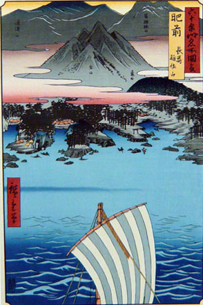 『六十余州名所図会』より 「 肥前 長崎 稲佐山 」。 —中景には淵神社などが描かれている。